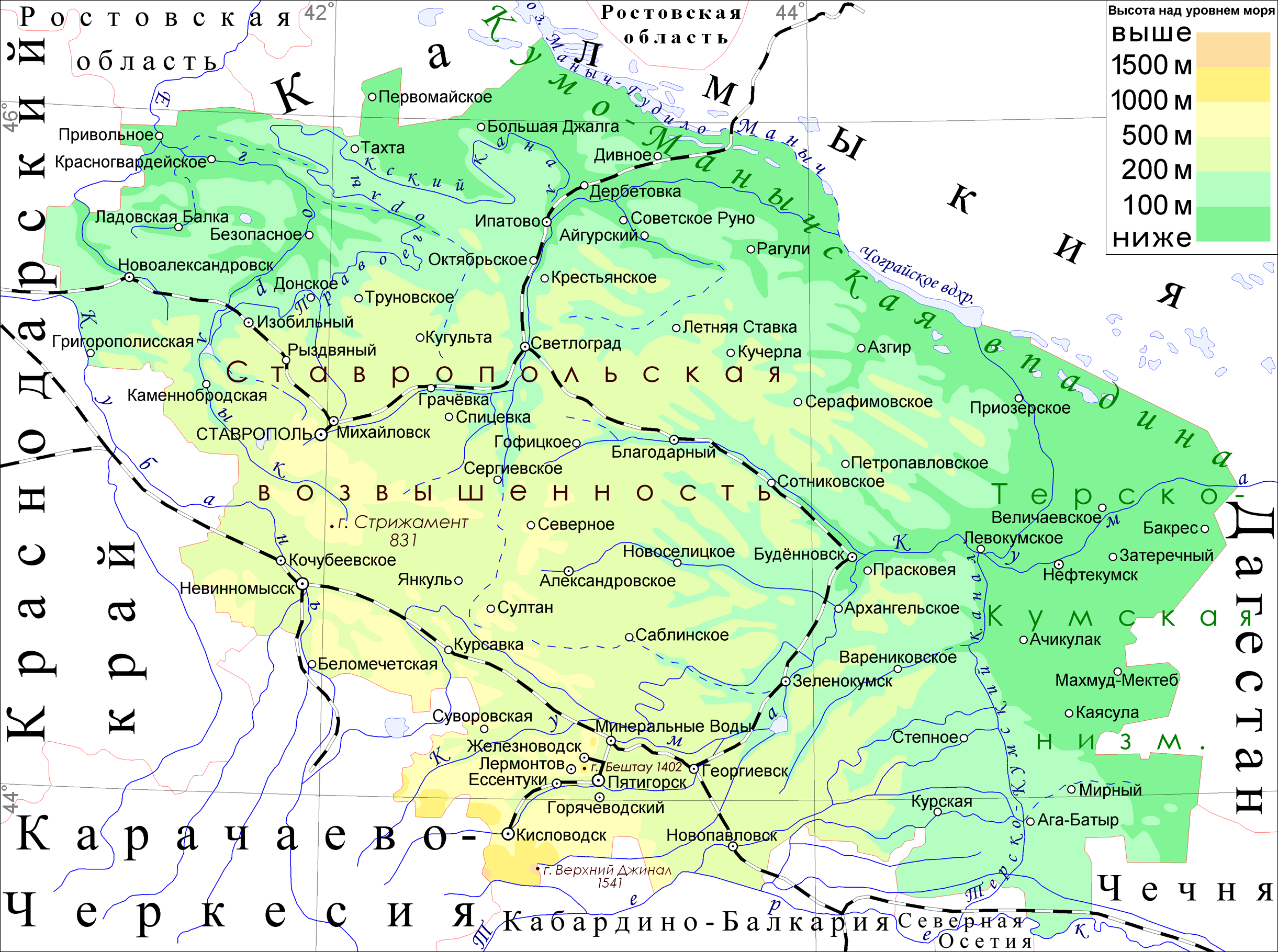 no original description